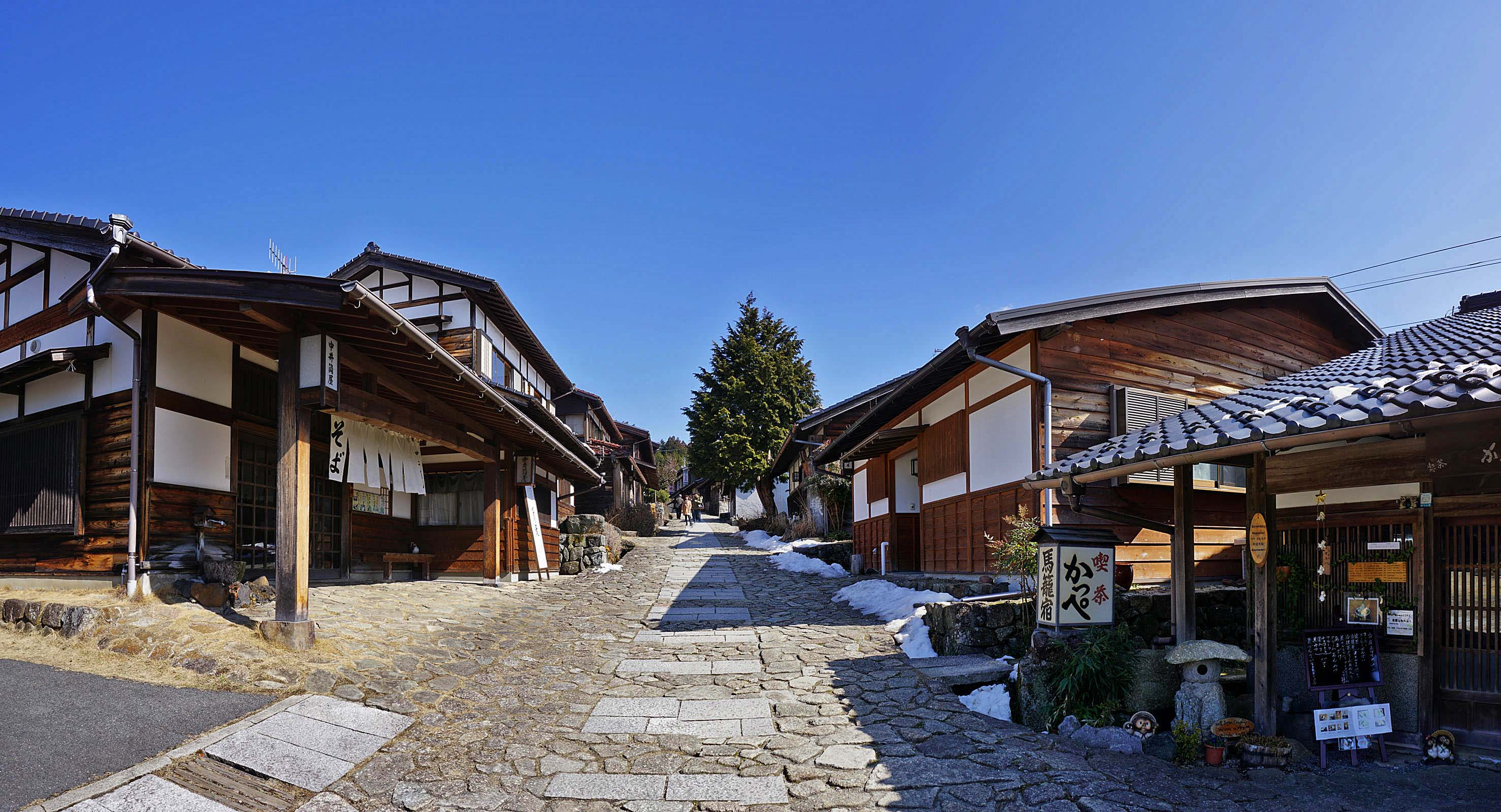 Magome-juku(post town) , 馬籠宿